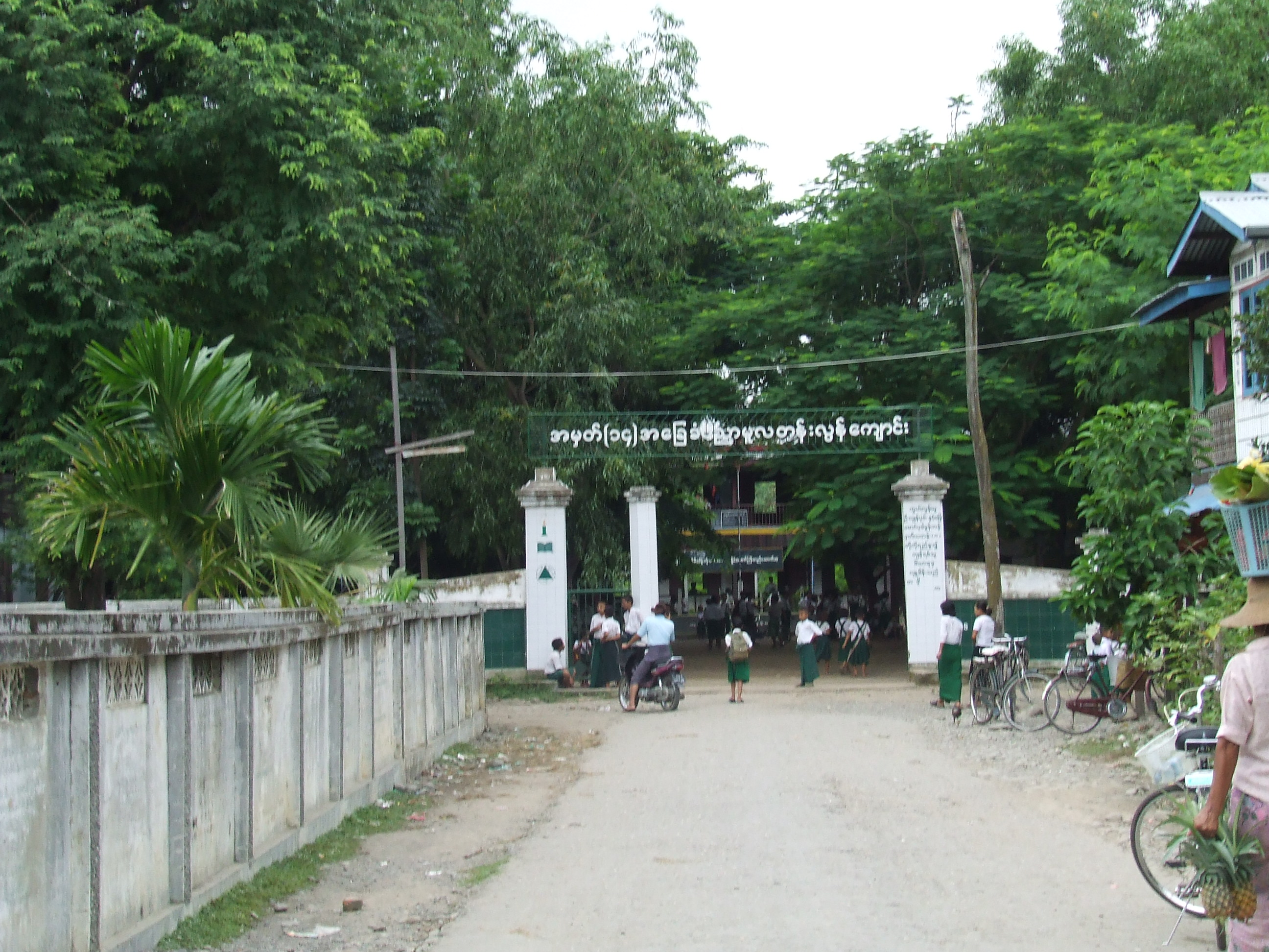 Kalaymyo, Myanmar